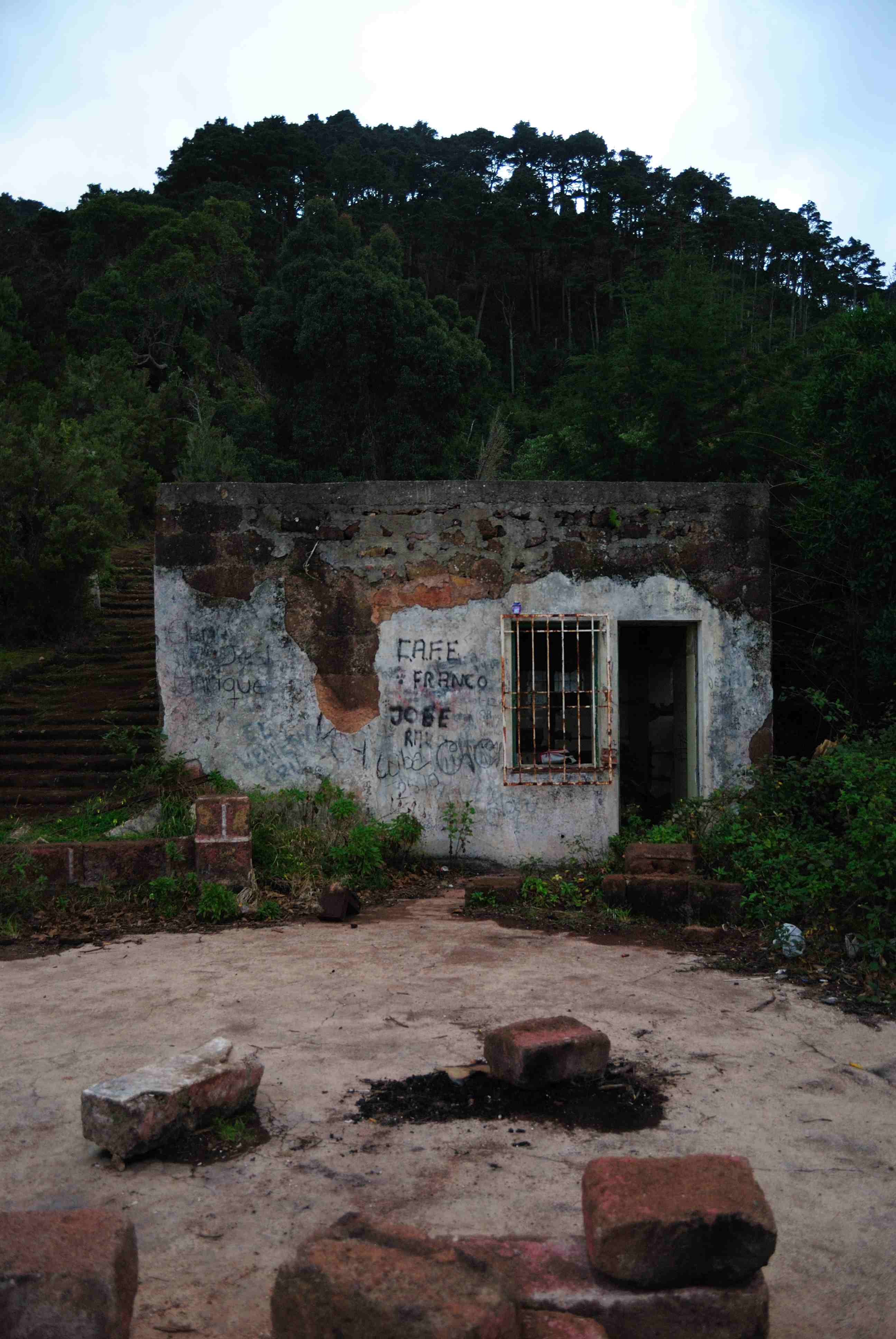 Antigua casa abandonada en medio del monte de Anaga - Tenerife